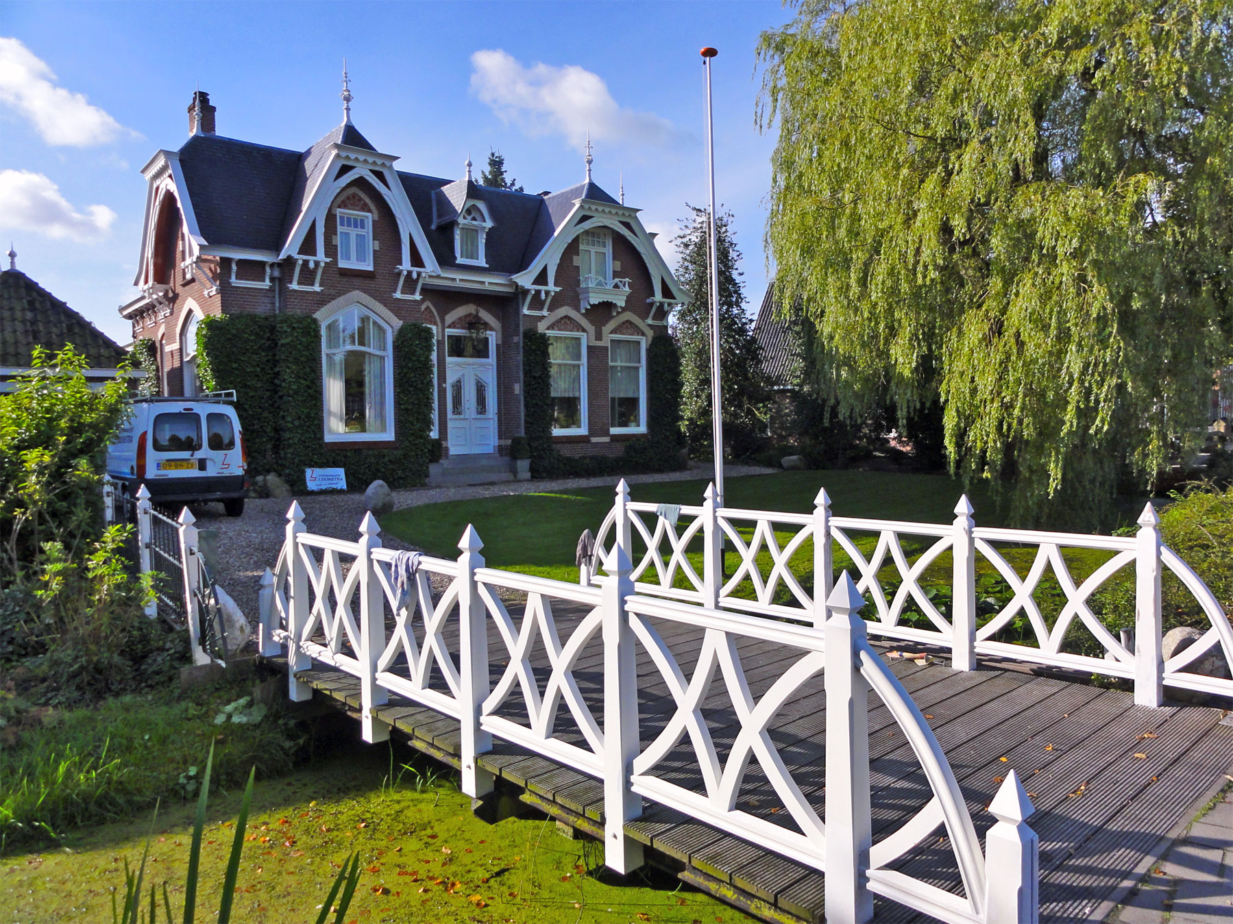 Strobosserweg 11 Dokkum, rijksmonument